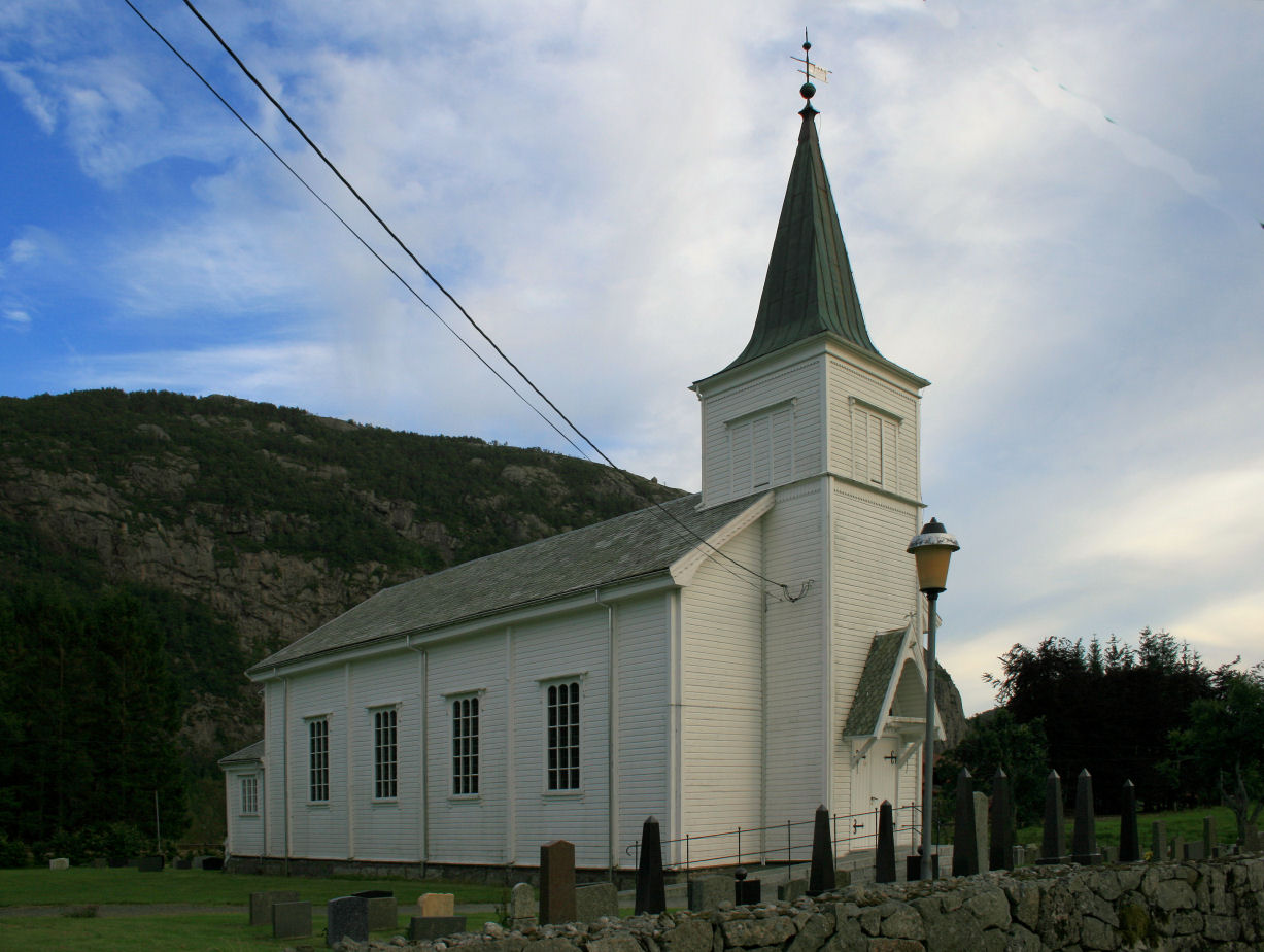 Heskestad kirke, Rogaland